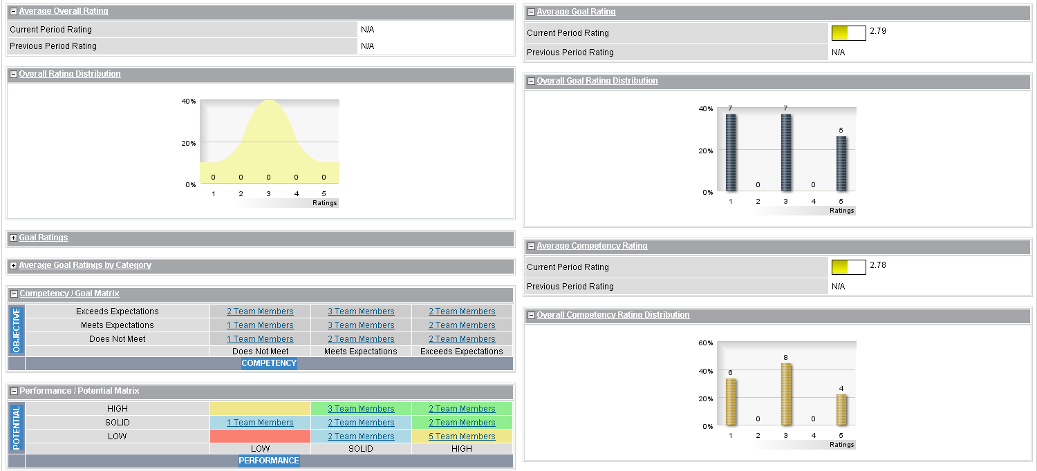 Dashboard sloužící ke zobrazení aktuálního stavu vybraných metrik